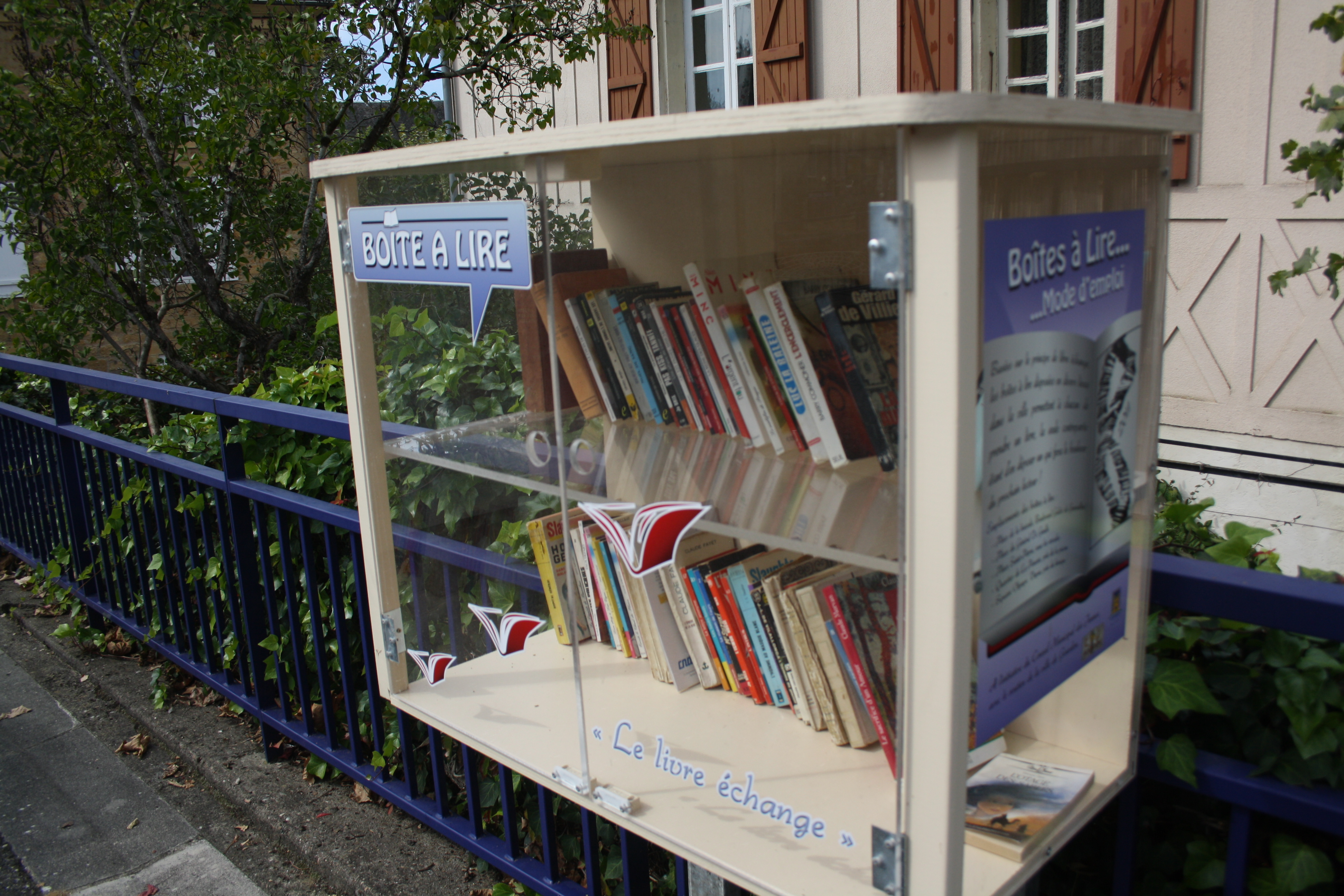 Boîte à Lire à Gourdon (Lot, France).